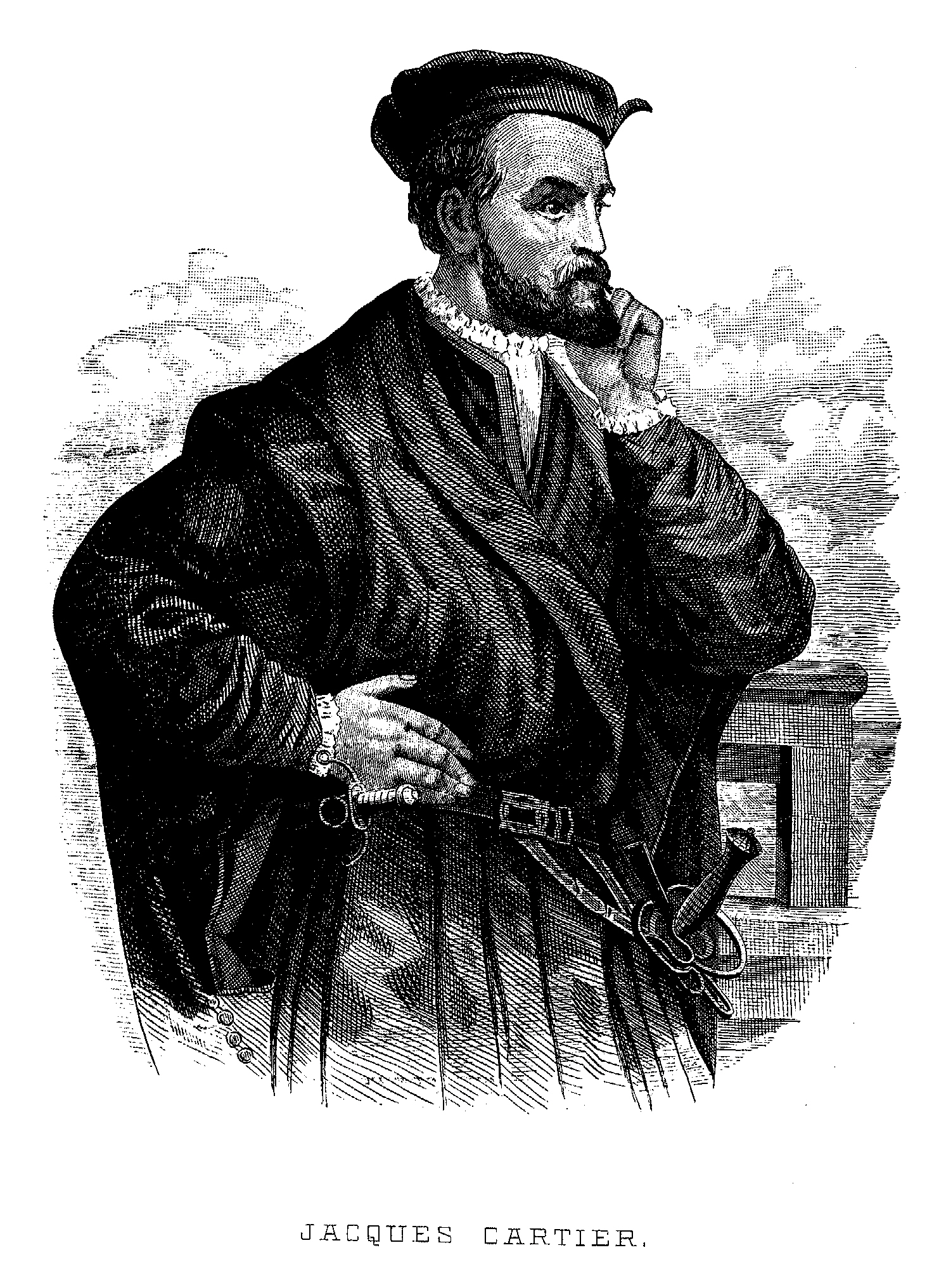 Jacques Cartier licence : infos : Gravure attribuée à Pierre-Louis Morin (1811-1886) vers 1854, d'après une toile de Théophile Hamel (1817-1870) peinte vers 1844 et d'après une toile (aujourd'hui perdue) de François Riss (1804-1886) peinte pour l'Hôtel-de-Ville de Saint-Malo en 1839... ; il n'existe aucun portrait authentique de Cartier !